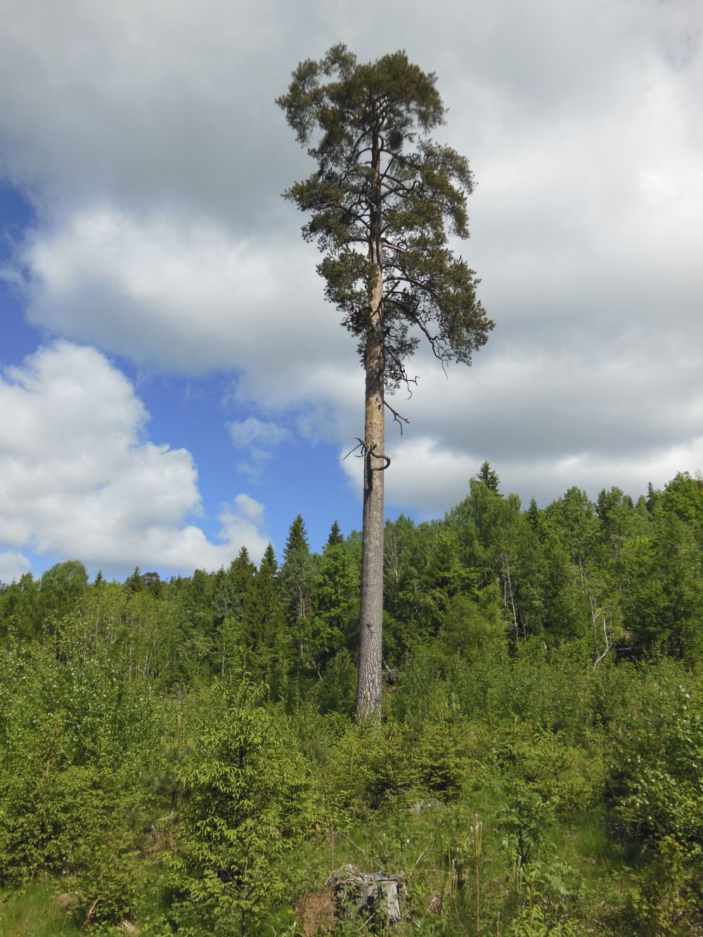 Seterfurua, en majestet på Eplerød.